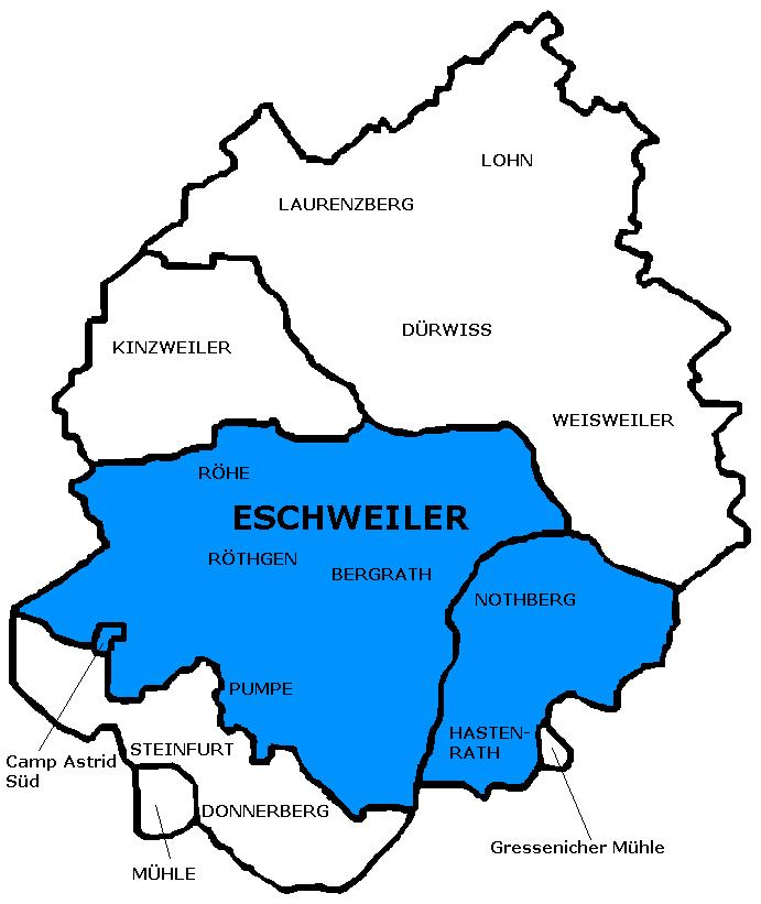 Ewentwicklung1935